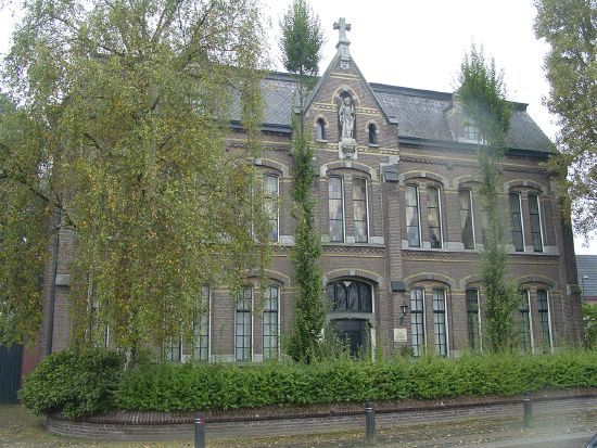 Foto geplaatst met toestemming van maker, M.M.G. van den Boomen (Deurne). Fratershuis aan de Visser te Deurne (NL).